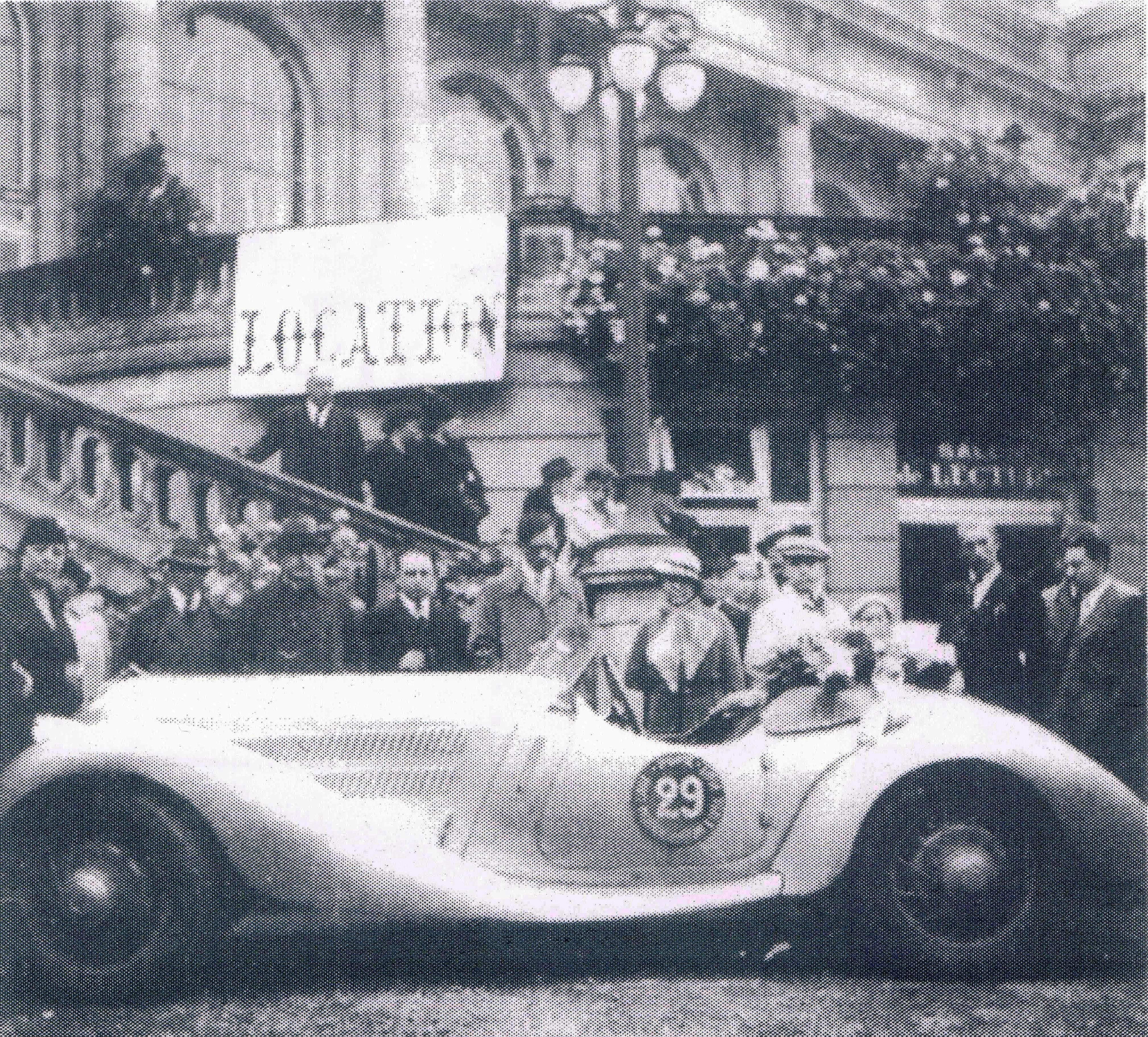 Lüttich-Rome-Lüttich 1937, das Hanomag team bei der Ankunft am Casino in Spa - Belgien, Karl Häberle - Walter Glökler, gewann der Spitzenfahrt auf einem Hanomag Sturm 23 K